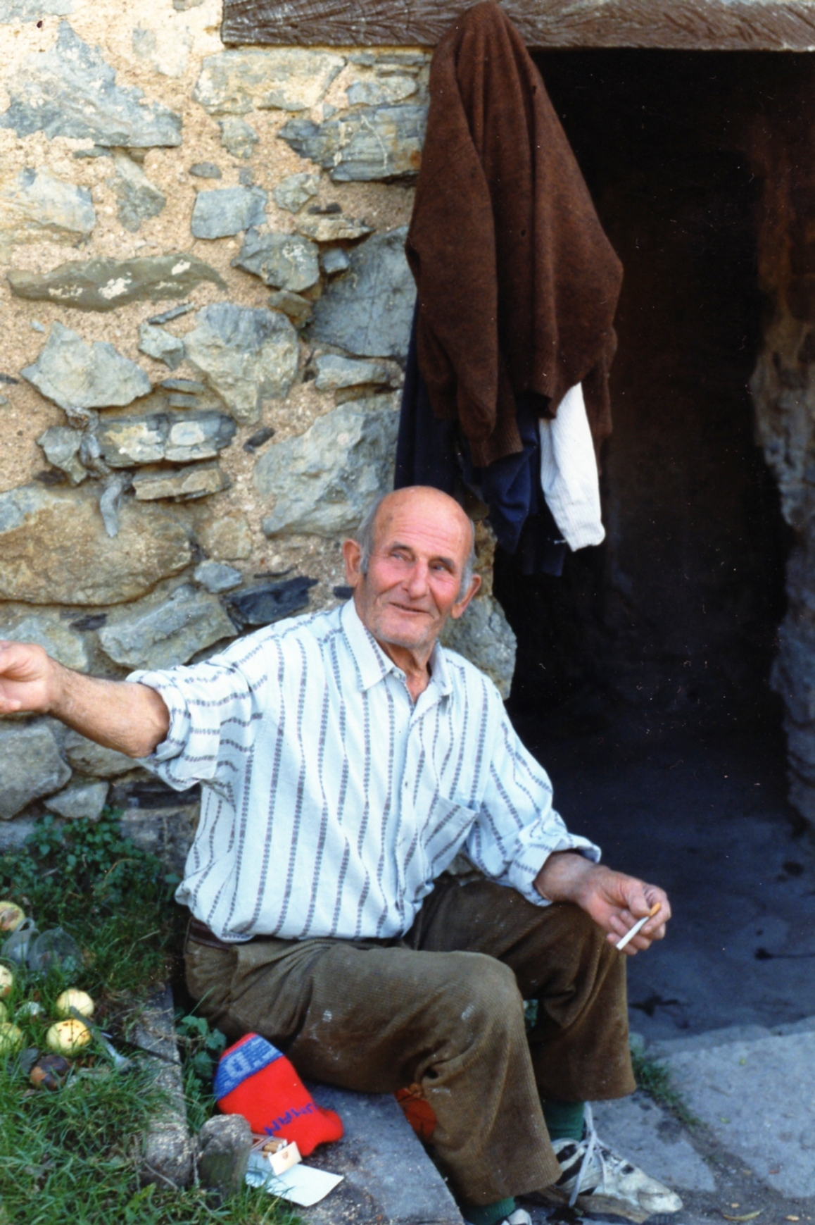 El "Rodri" en la puerta del que fue su hogar: La Canova.